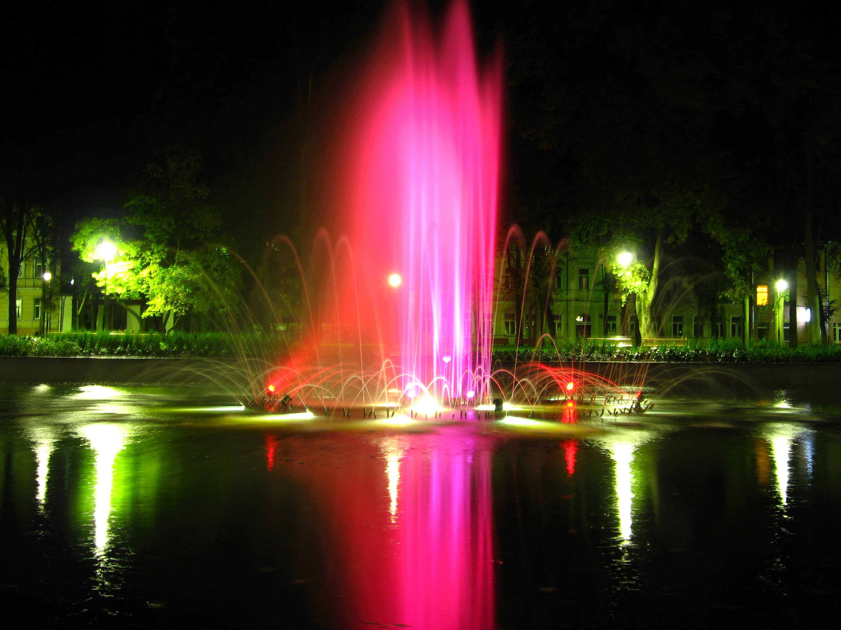 Ночной фонтан 1